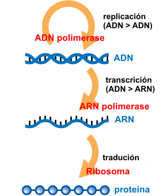 central dogma simple translated to Galician